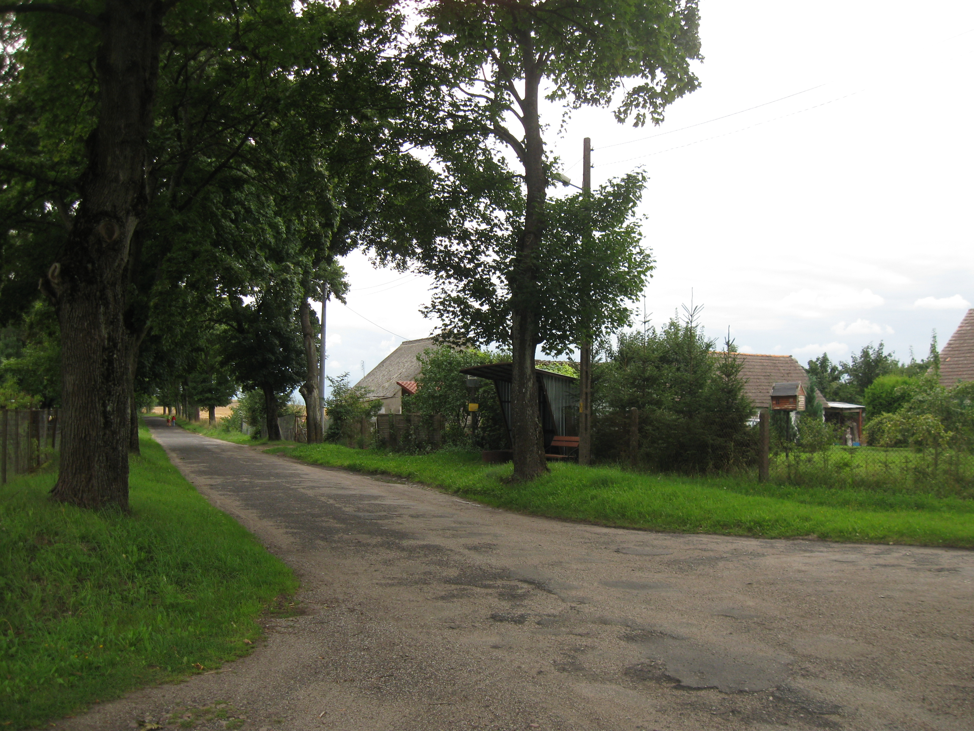 Grąd - centrum wsi